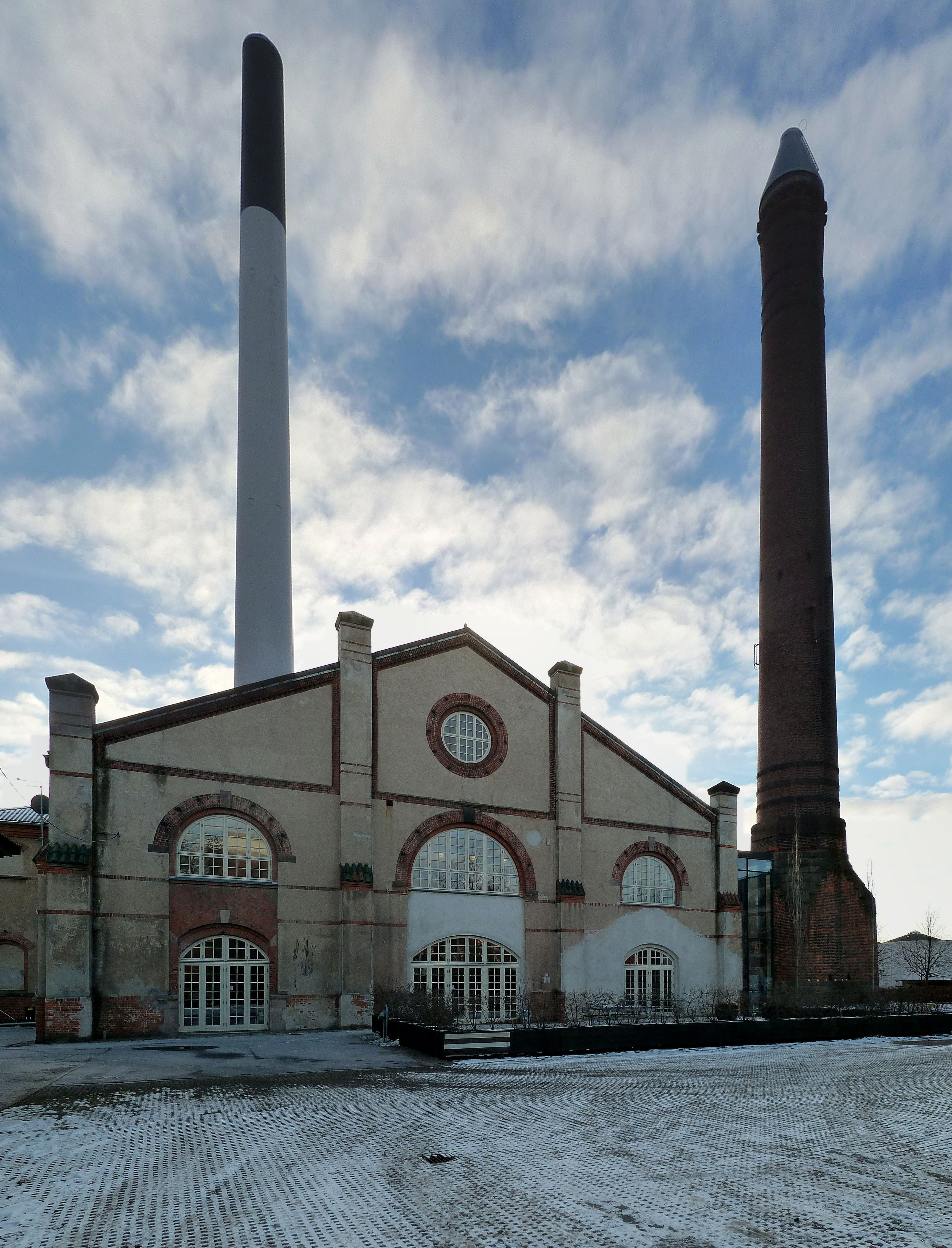 Keddelhallen in the Frederiksberg district of Copenhagen, Denmark